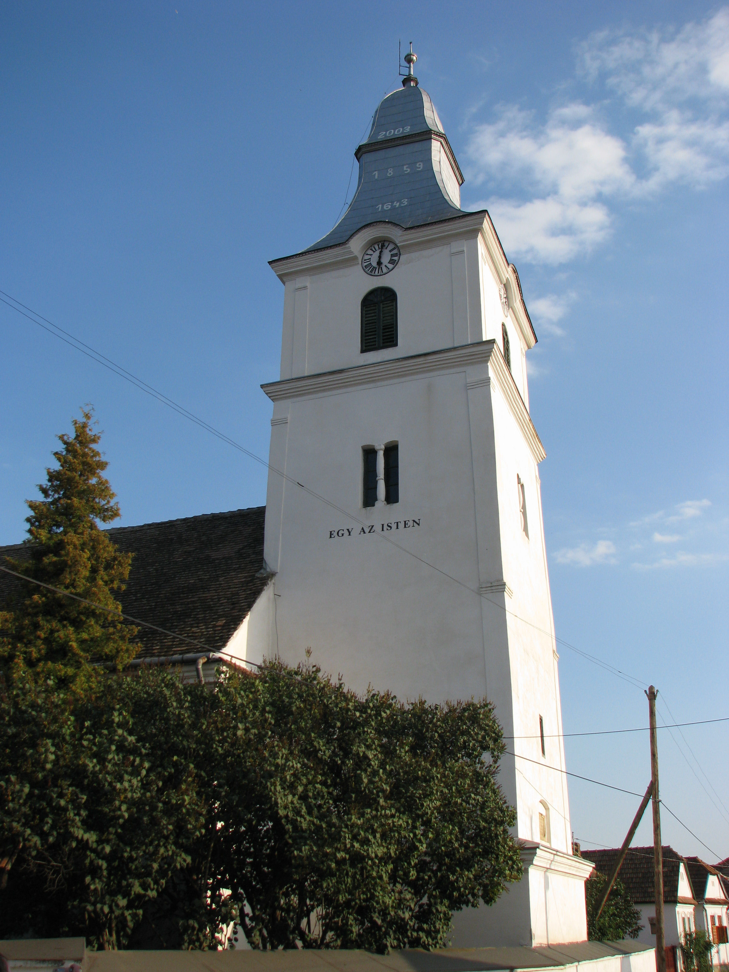 Torockószentgyörgyi unitárius templom